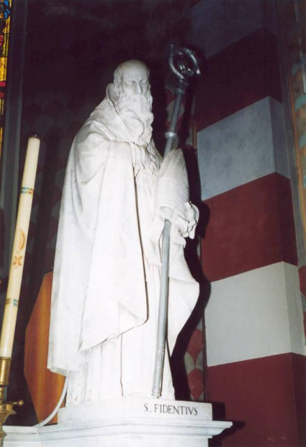 Statua San Fidenzio vescovo, chiesa arcipretale Megliadino San Fidenzio, licenza pubblica